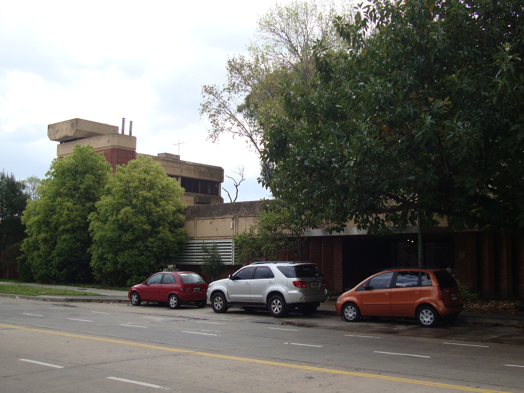 Vista parcial de la fachada y entrada principal del edificio del Instituto de Geocronología y Geología Isotópica (INGEIS), dependiente del CONICET, en Ciudad Universitaria. Buenos Aires, Argentina.